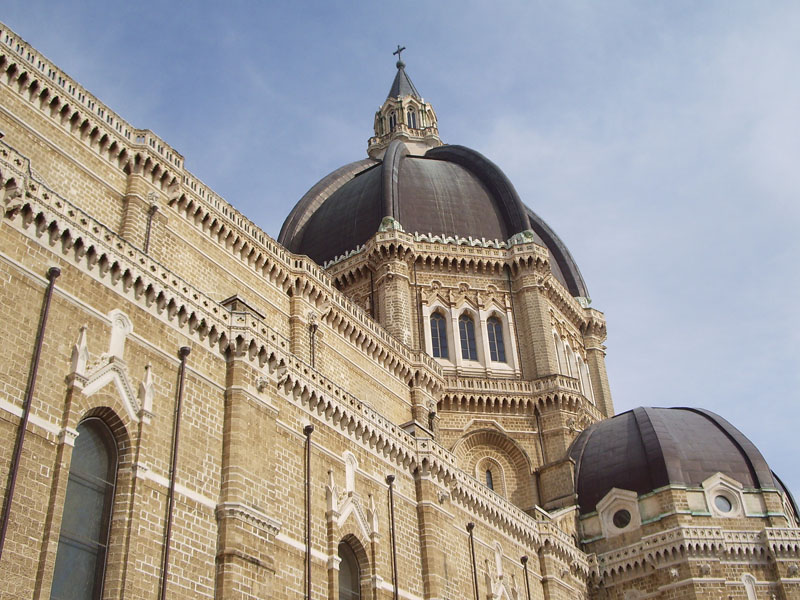 Particolare del Duomo Tonti di Cerignola (FG).